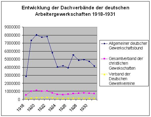 Mitgliederentwicklung der Spitzenverbände der deutschen Arbeitergewerkschaften 1918-1931. Quelle der Daten: Michael Schneider: Höhen, Krisen und Tiefen. Die Gewerkschaften in der Weimarer Republik 1918 bis 1933. In: Klaus Tenfelde u.a.: Geschichte der deutschen Gewerkschaften. Köln, 1987